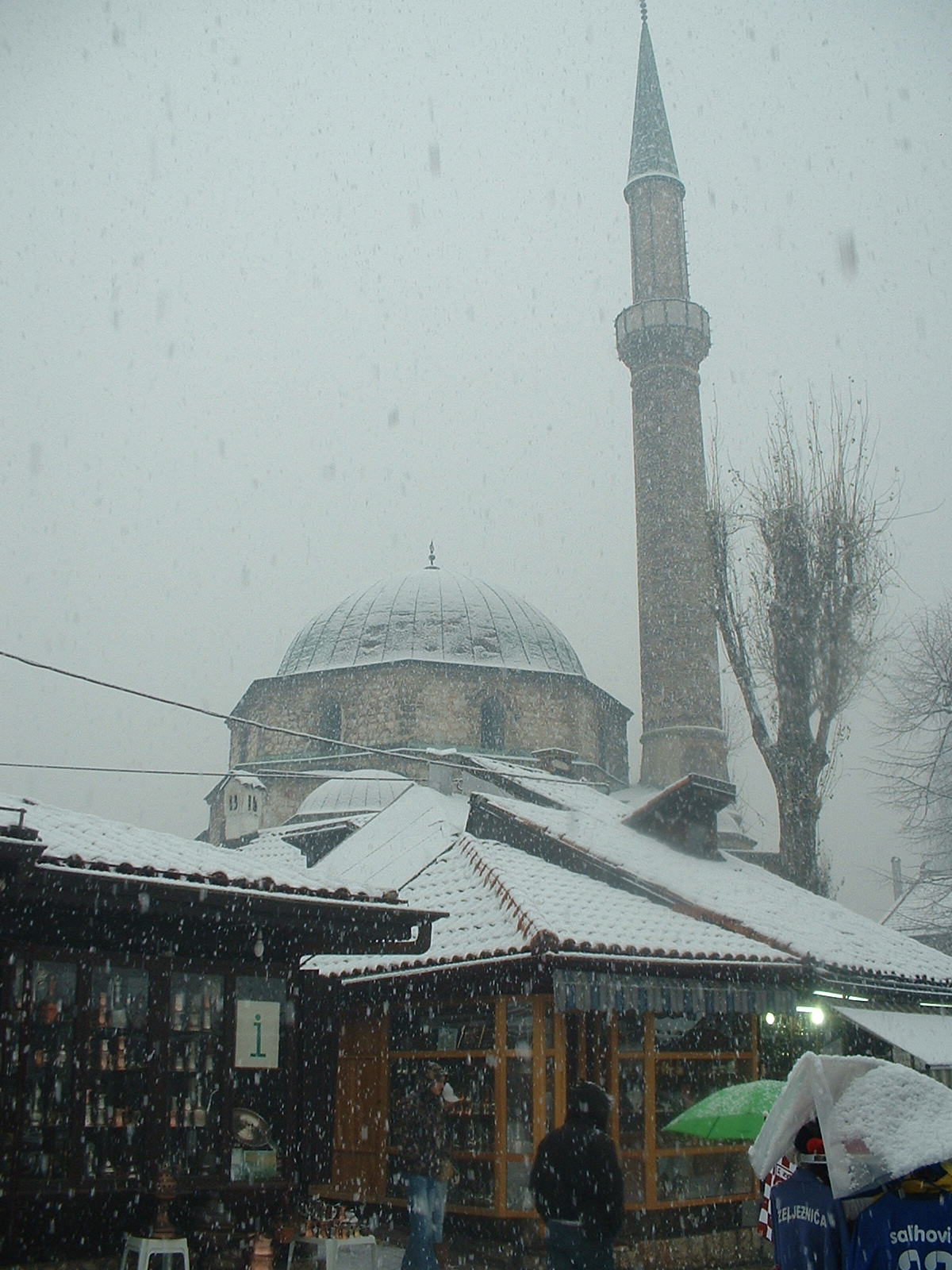 sarajevo